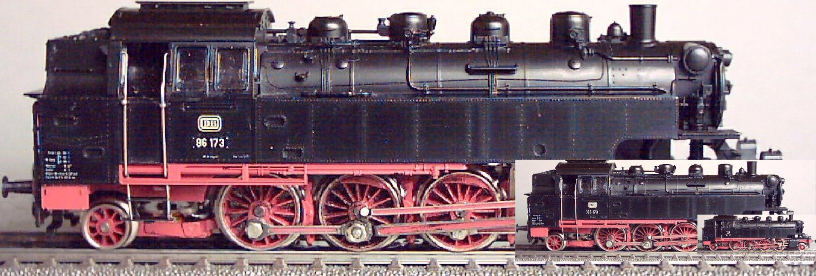 Modellocomotief (Märklin 3096) afgebeeld op schalen 1, H0 en Z. Eigen werk. N.B. De werkelijke lengte van de loc in schaal H0 is 157mm. Bij een resolutie van 1152 x 864 pixels op een monitor van 17" worden de modellen op ware grootte afgebeeld.